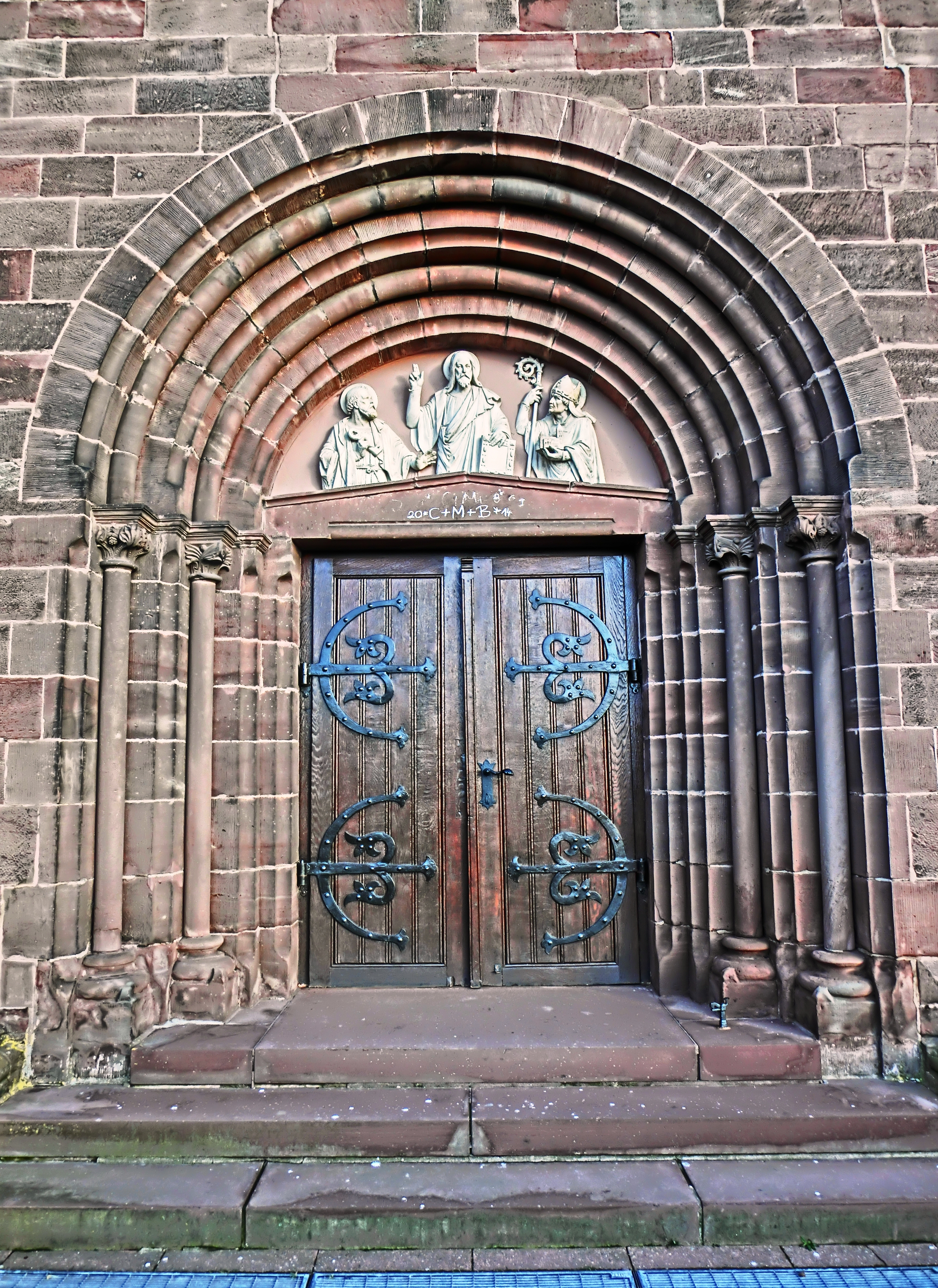 m Tympanon des Hauptportals sind im Halbrelief Christus als Pantokrator zwischen dem Stiftspatron Petrus und dem Pfarrpatron Martin abgebildet. Die Skulpturen schuf Carl Dopmeyer.